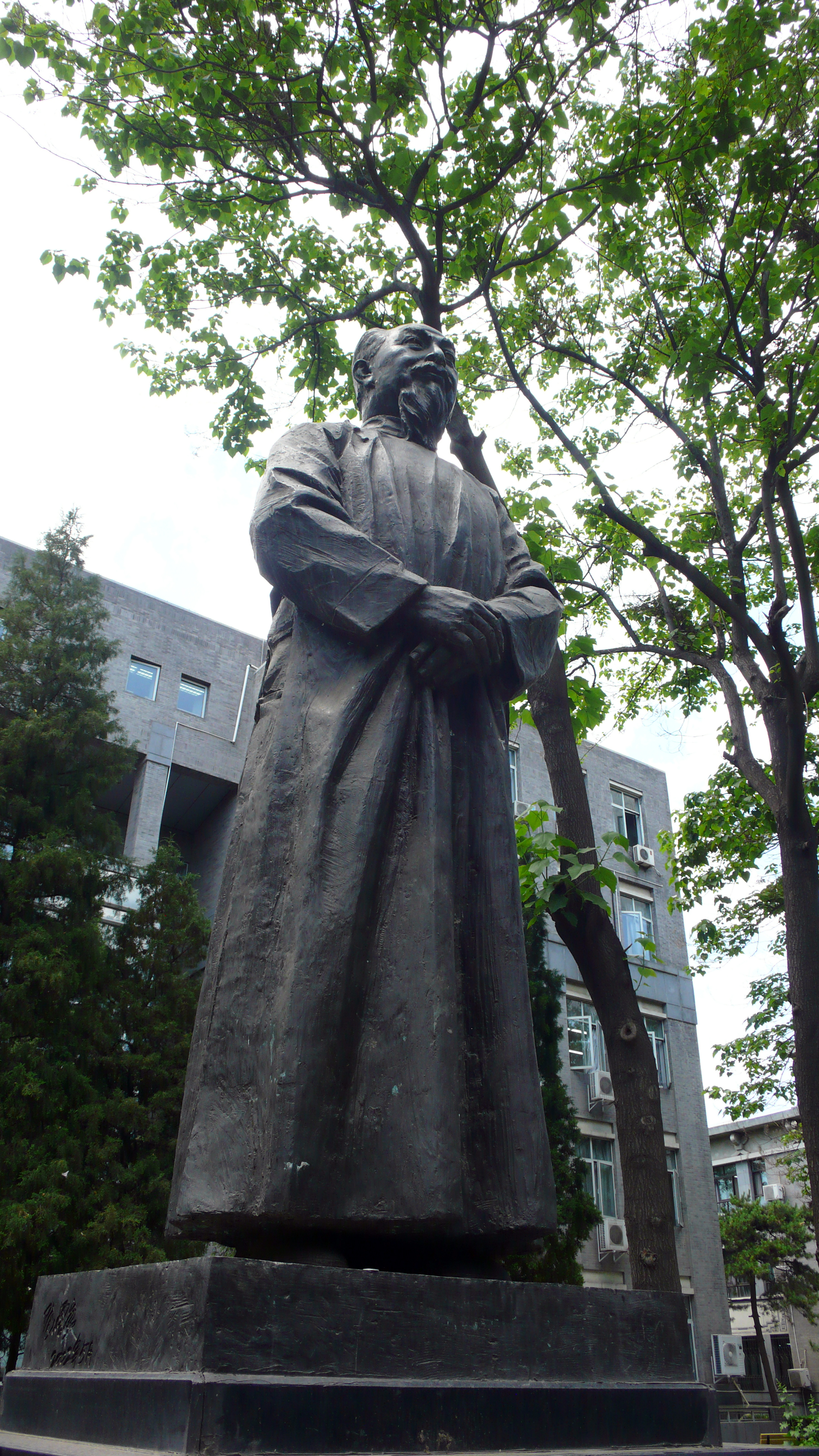 北师大陈垣校长像。